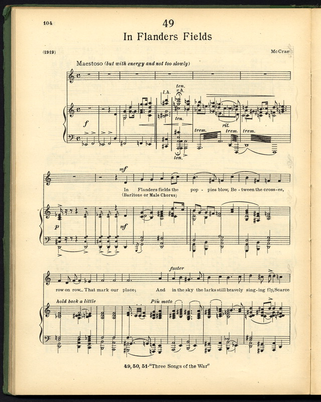 114 Songs